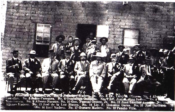 Fotografía oficial de los vencedores de la Batalla de Ciudad Juárez (México, es:1911). En la fila inferior, de izquierda a derecha, en primer lugar se aprecia José María Pino Suárez; en tercer lugar Venustiano Carranza (5); en quinto Francisco I. Madero (1) y en último Pascual Orozco (10). En la fila superior, de izquierda a derecha, aparece en primer lugar Francisco Villa, en segundo Gustavo Madero y finalmente el General Blanco. Por haber sido tomada en 1911 esta fotografía se considera en el dominio público en los Estados Unidos.